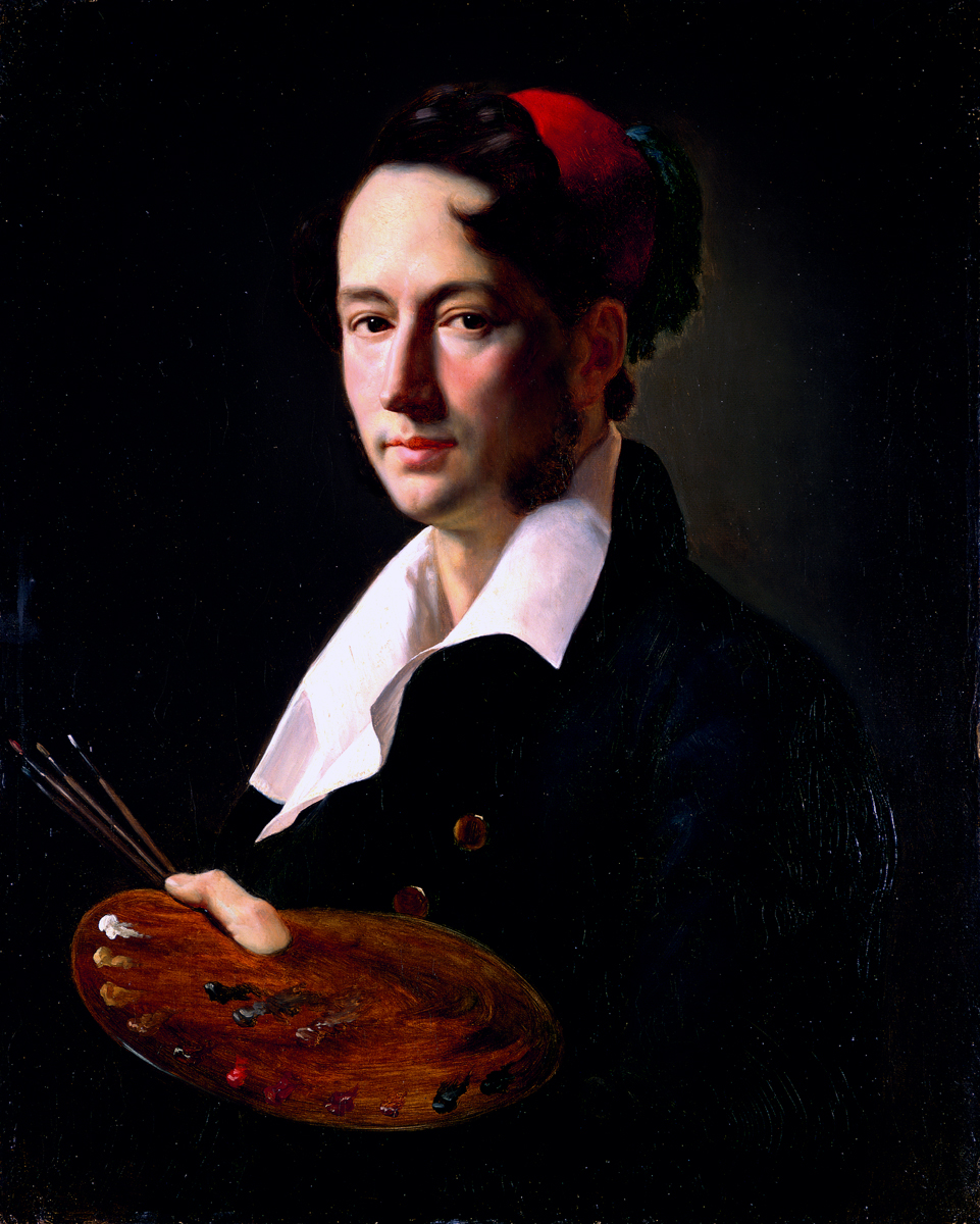 Jean-Claude Bonnefond (1796 - 1860) peintre